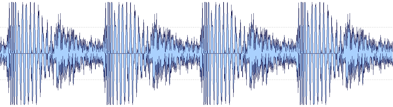 Music Produktion: Sidechain Effekt Bypass (Wave)